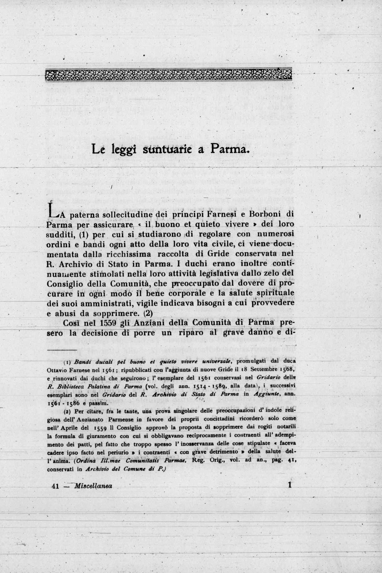 pagina 641